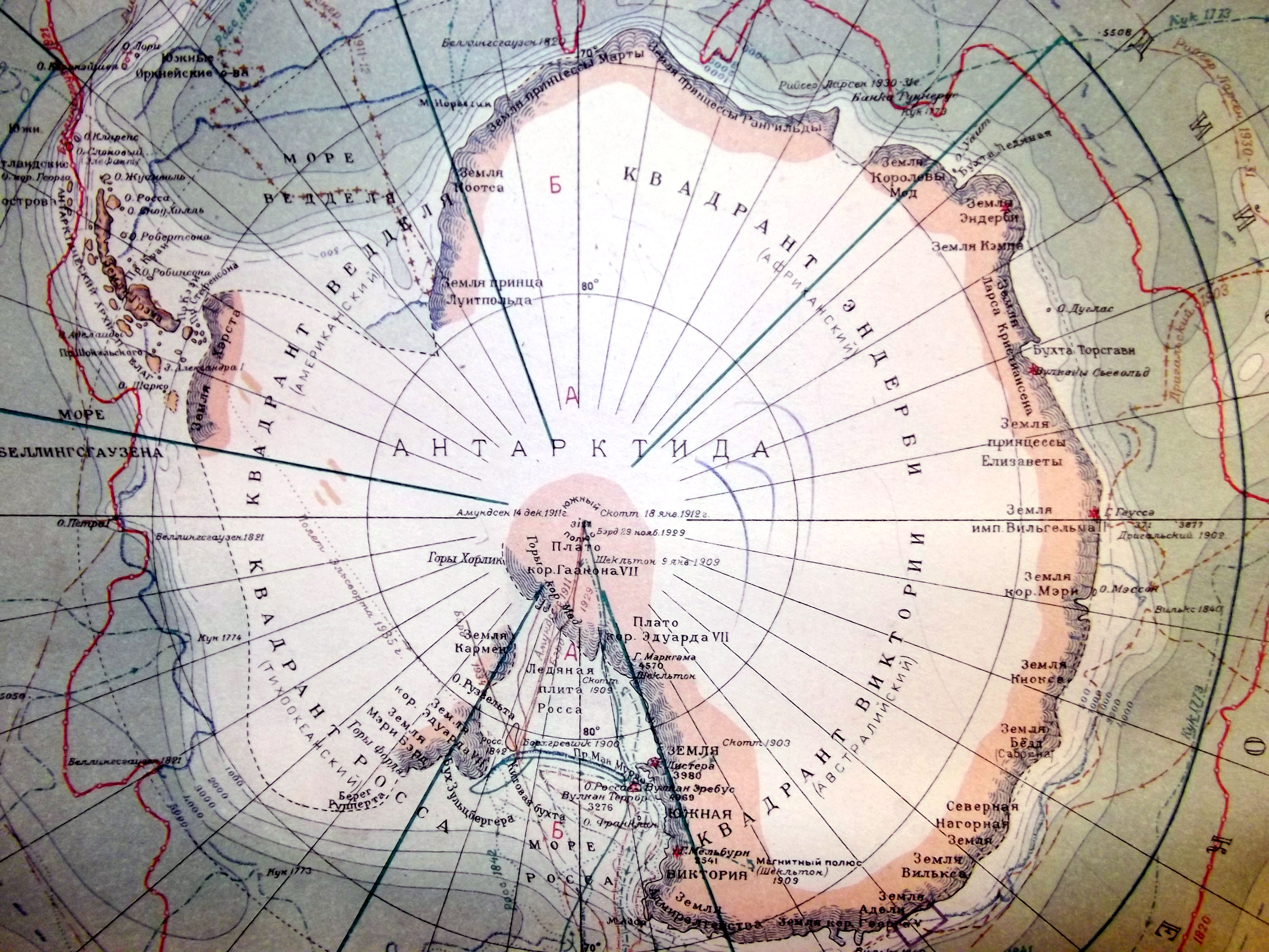 Фрагмент карты Антарктики